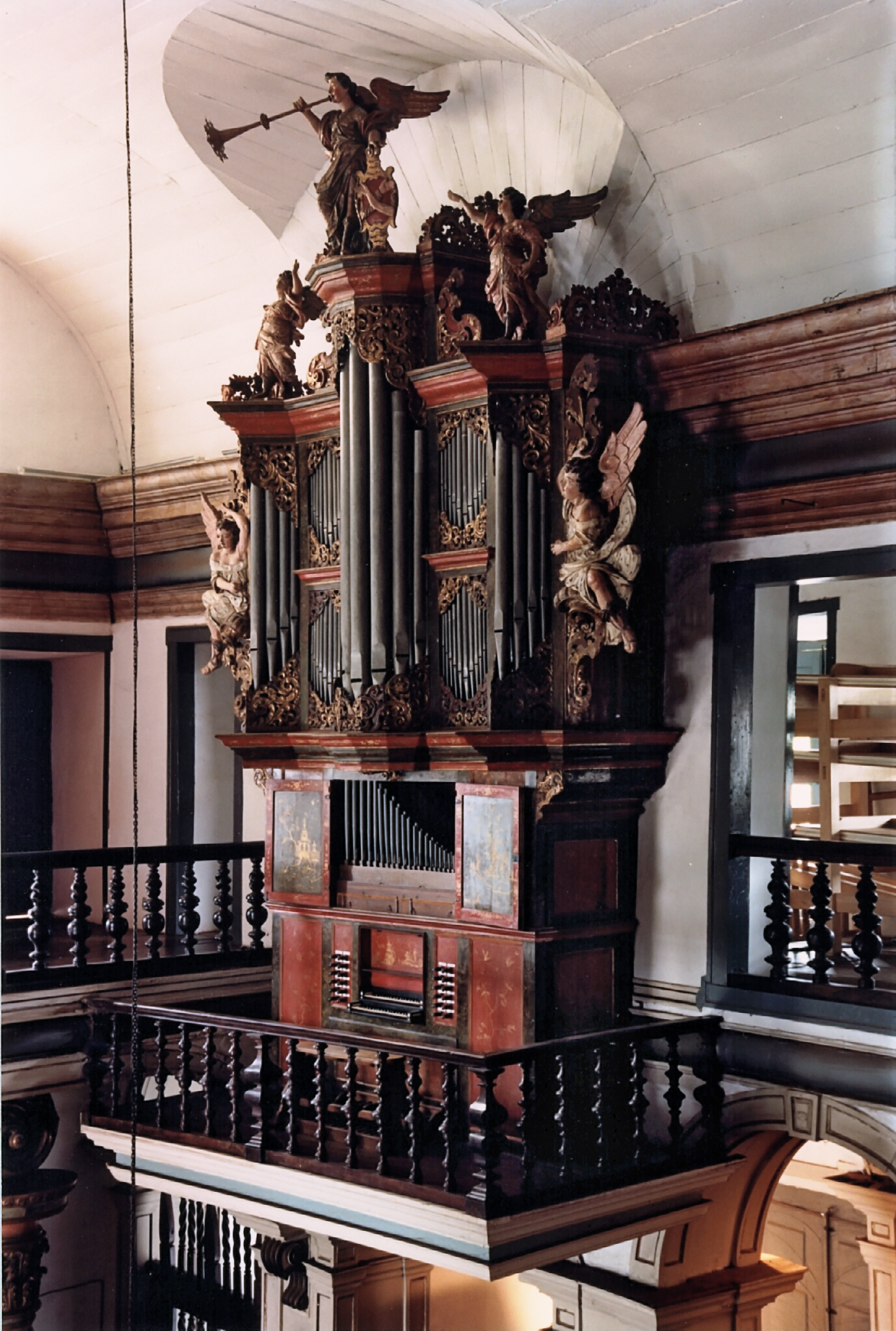 Schnitger Organ Mariana Brazil